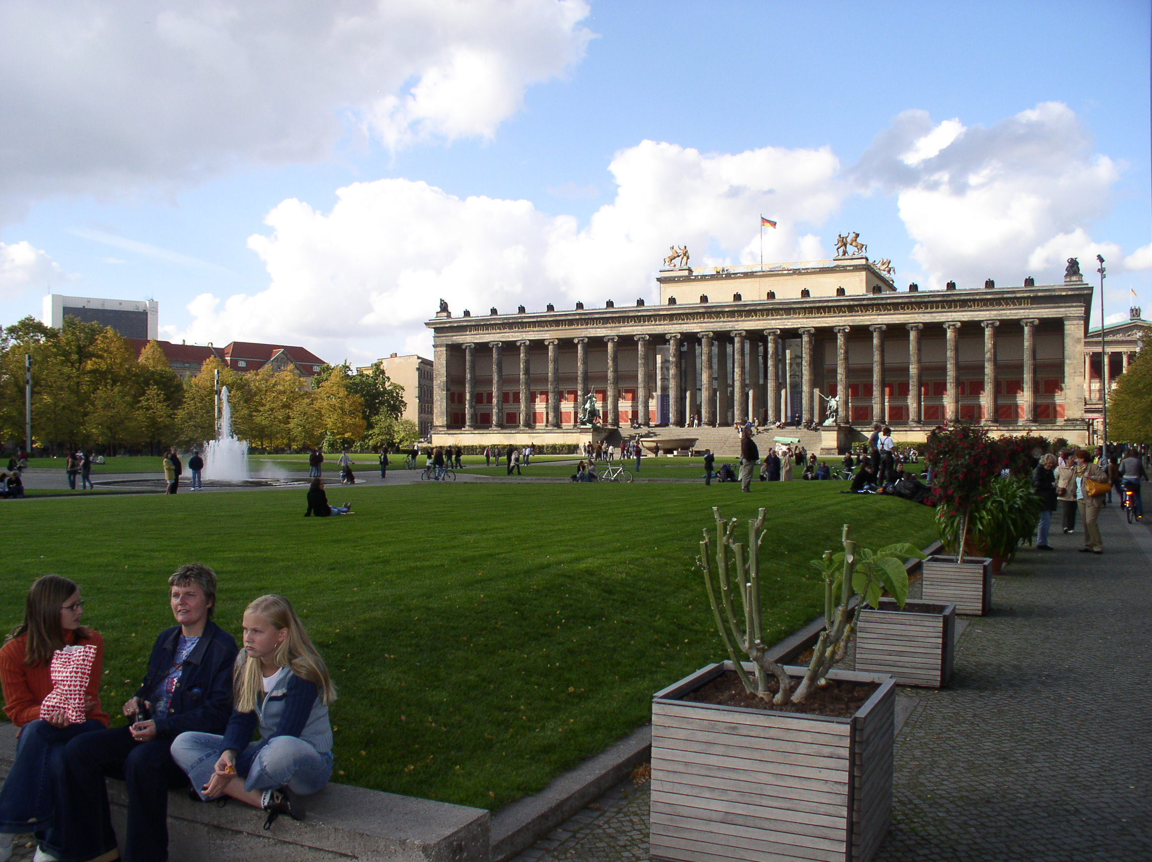 Altes Museum, Lustgarten, Berlin